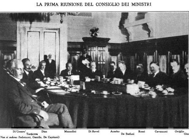 Fotografia della prima riunione del Consiglio dei Ministri del Governo Mussolini